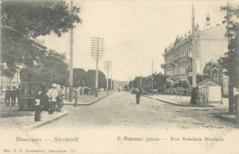 Большая Морская улица